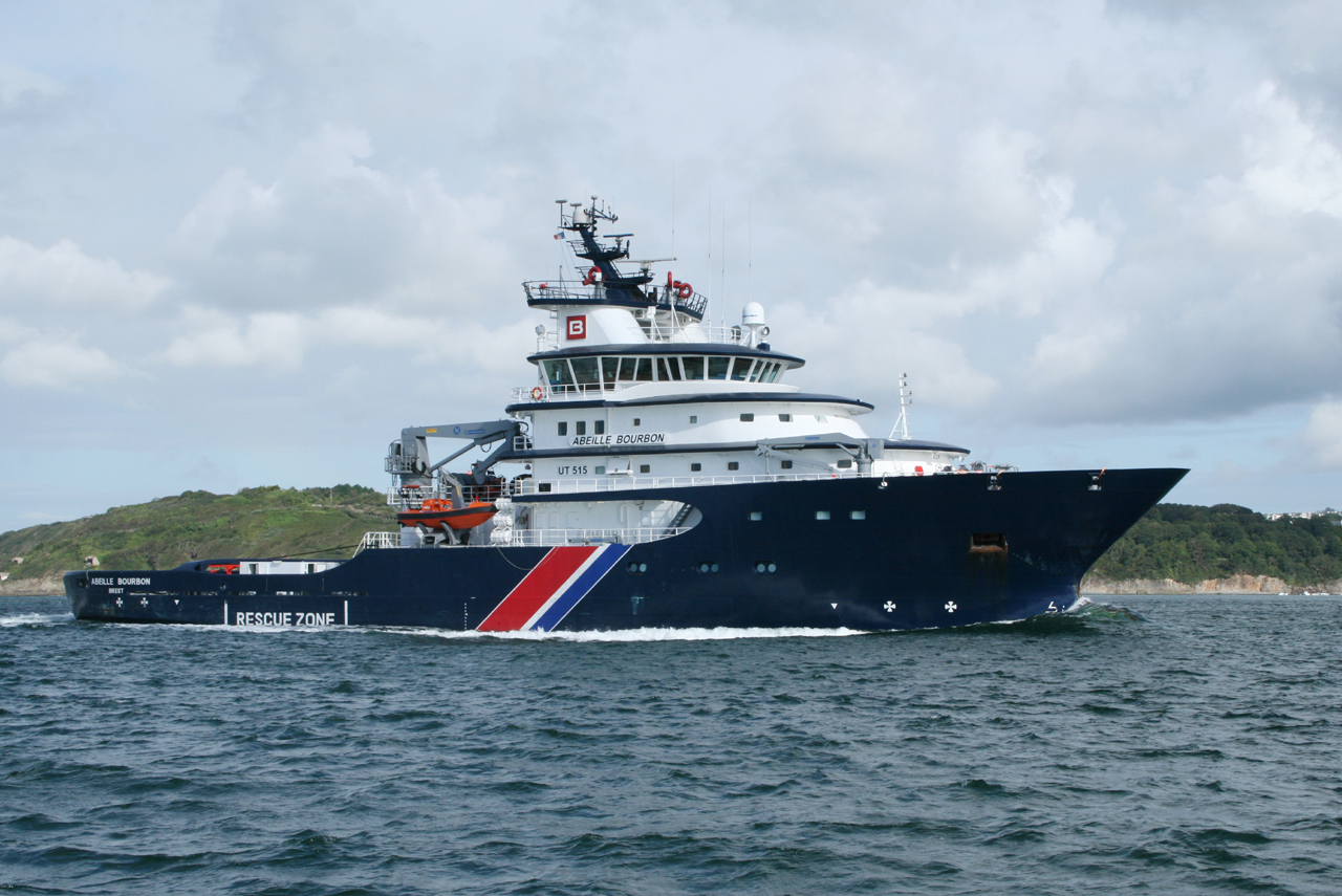 L'Abeille Bourbon dans le goulet de Brest